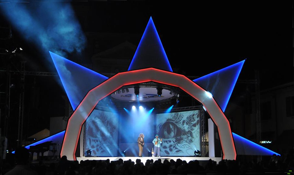 Piazza Silvagni durante la seconda edizione del "Festival sotto le Stelle".